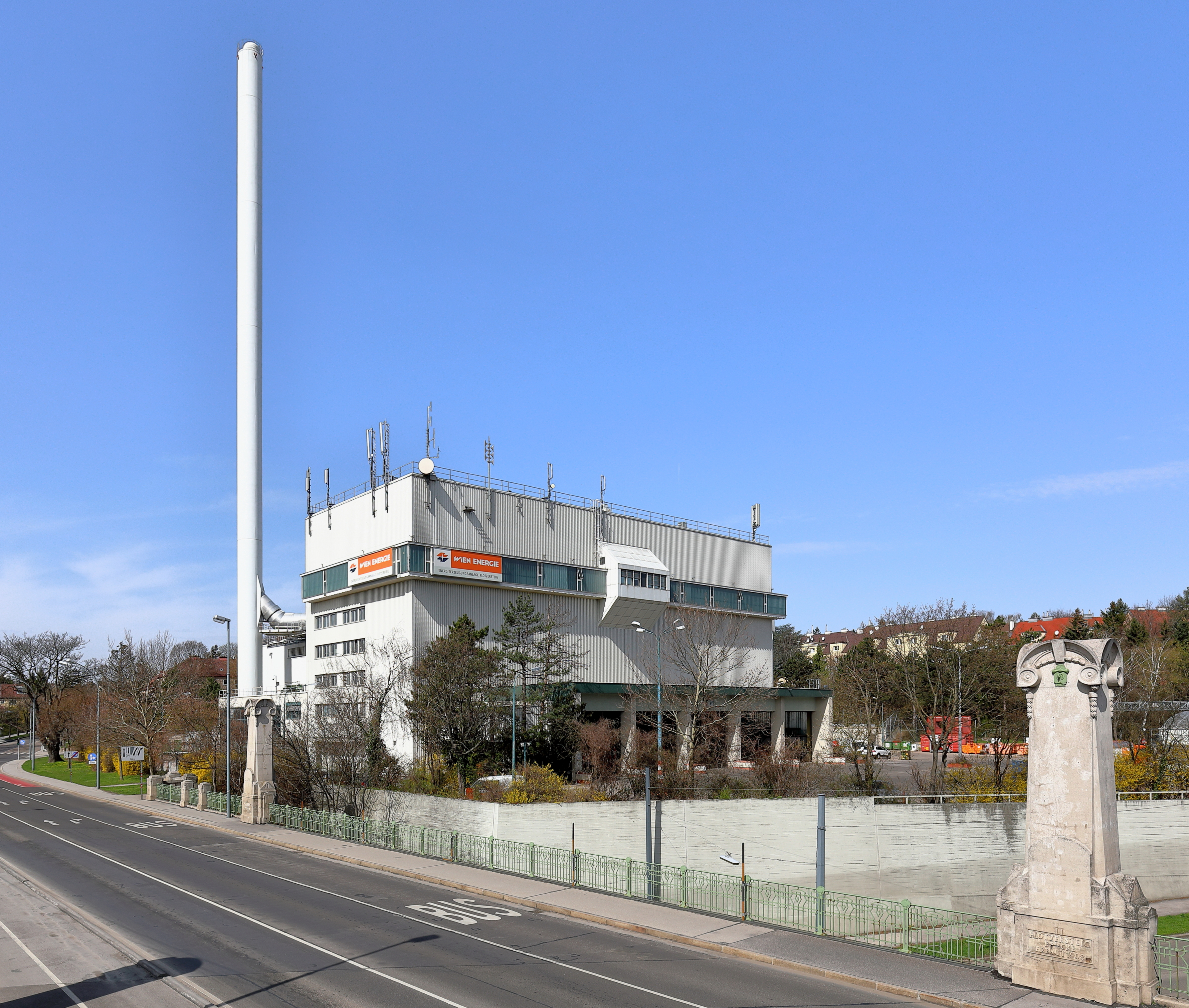 Die Müllverbrennungsanlage Flötzersteig im 16. Wiener Gemeindebezirk Ottakring und im Vordergrund die 1908/1909 errichtete Flötzersteigbrücke.Die Anlage wurde ab 1960 nach Plänen von Josef Bervar von der Firma Simmering-Graz-Pauker AG errichtet und ging 1963 als erste Müllverbrennungsanlage Wiens in Betrieb. Sie verbrennt bis zu 200.000 Tonnen Restmüll pro Jahr (Stand 2018). Zwischen 1992 und 1993 wurde eine zusätzliche Filteranlagen (DeNOx-Anlage) eingebaut. In diesem Zuge wurde auch der jetzt rd. 100 Meter hohe Schlot neu errichtet.